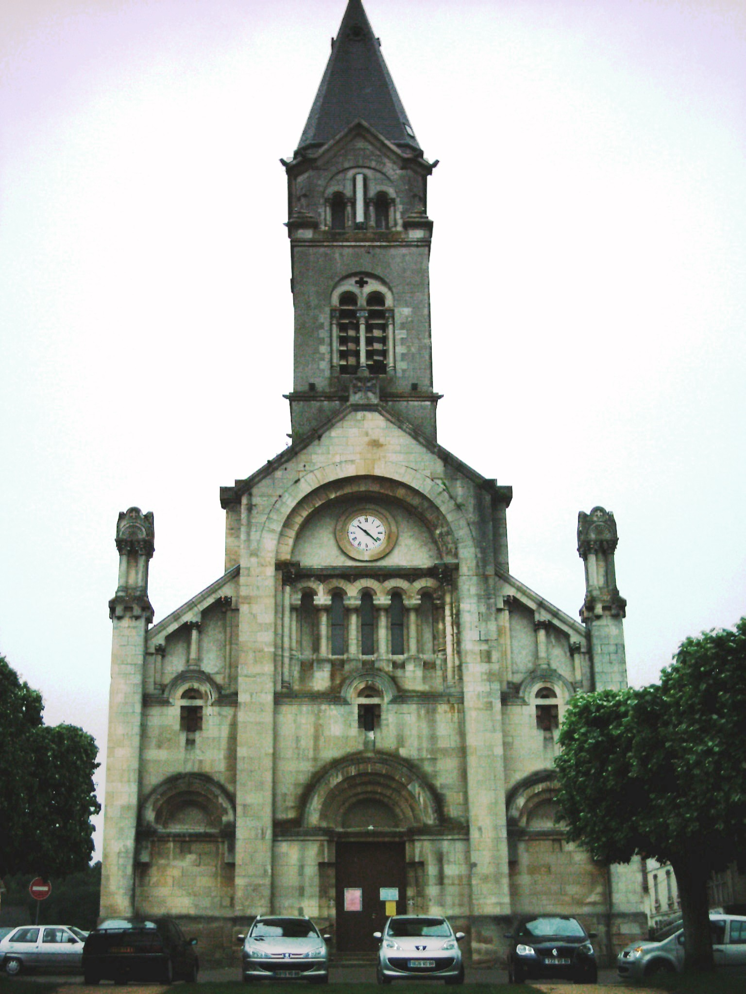 chiesa di Chantraine, da un lavoro personale